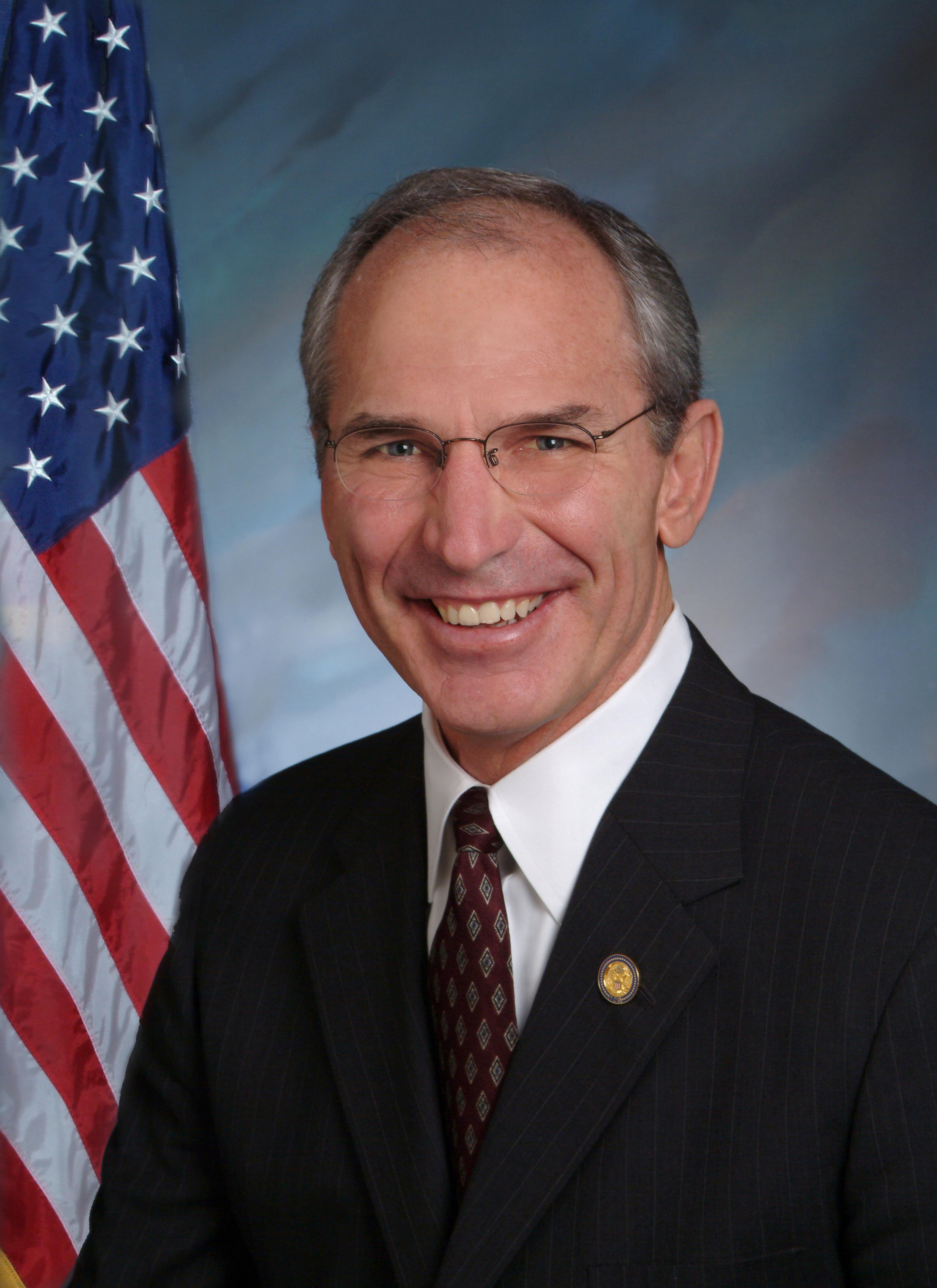 Rep Bob Beauprez from Colorado